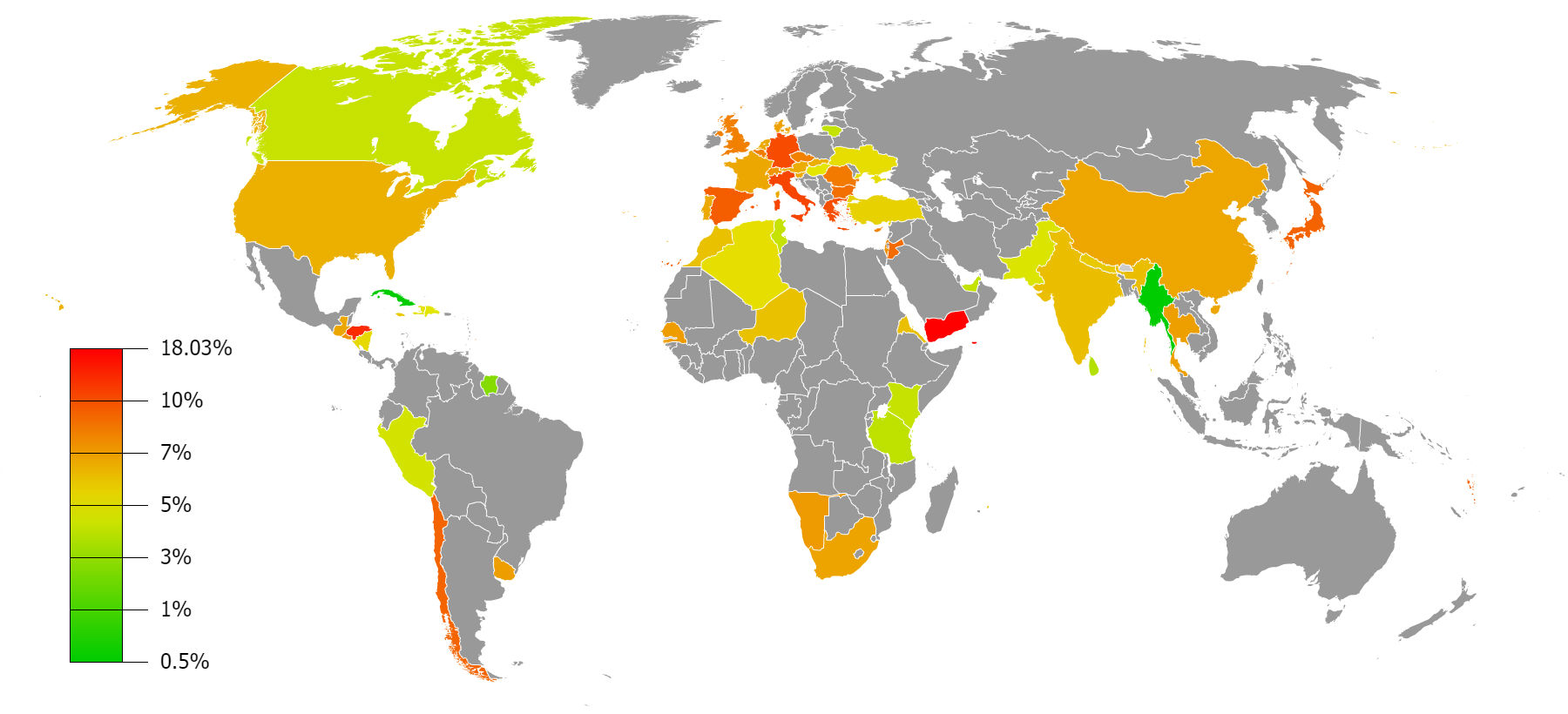 Ovo je karta svijeta sa pobojanim državama koje imaju preko 0.5% potrošnje električne energije iz solarnih izvora.